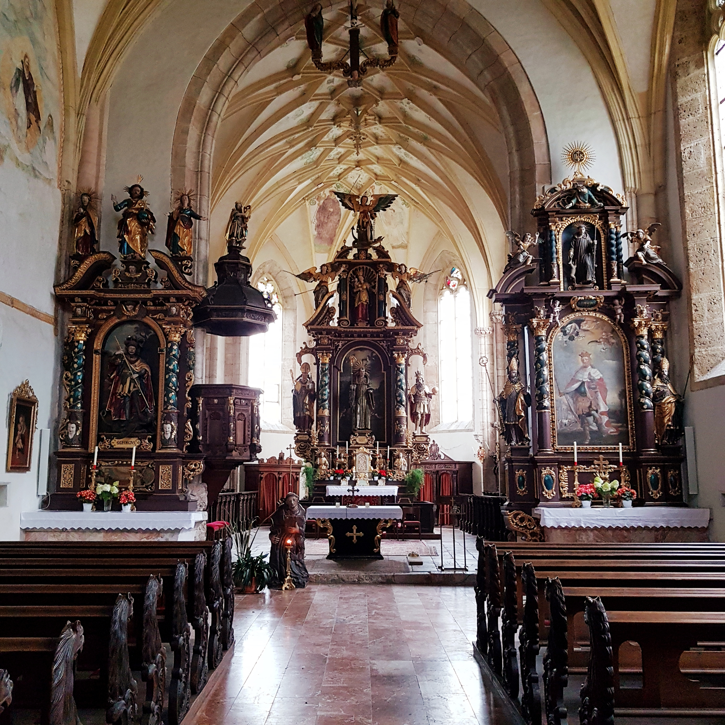 Filialkirche St. Leonhard bei Kundl